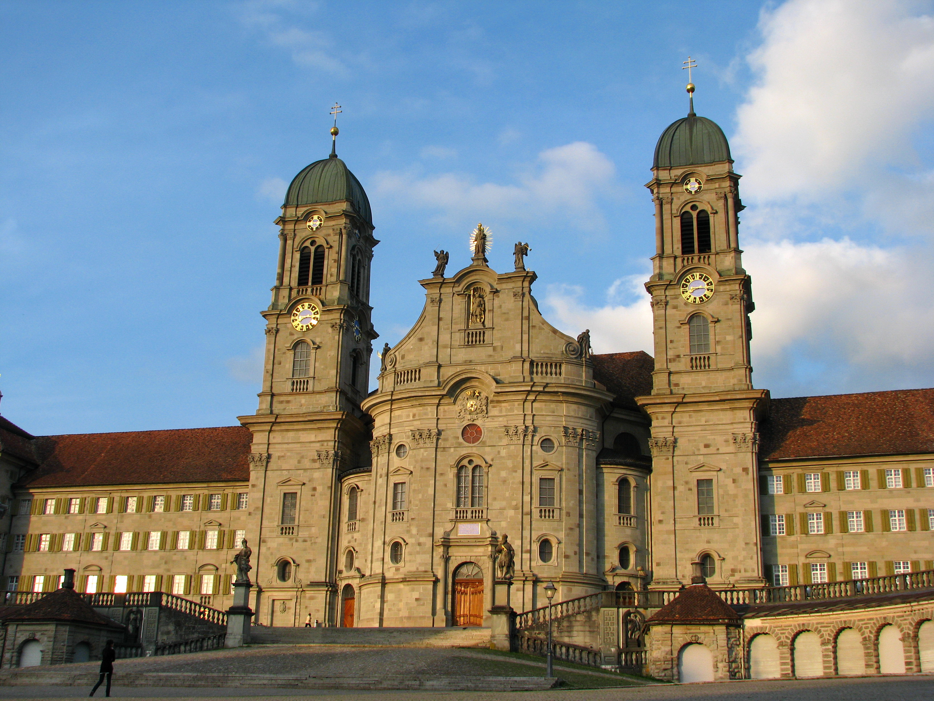 Abbey church in Einsiedeln (SZ) in Switzerland